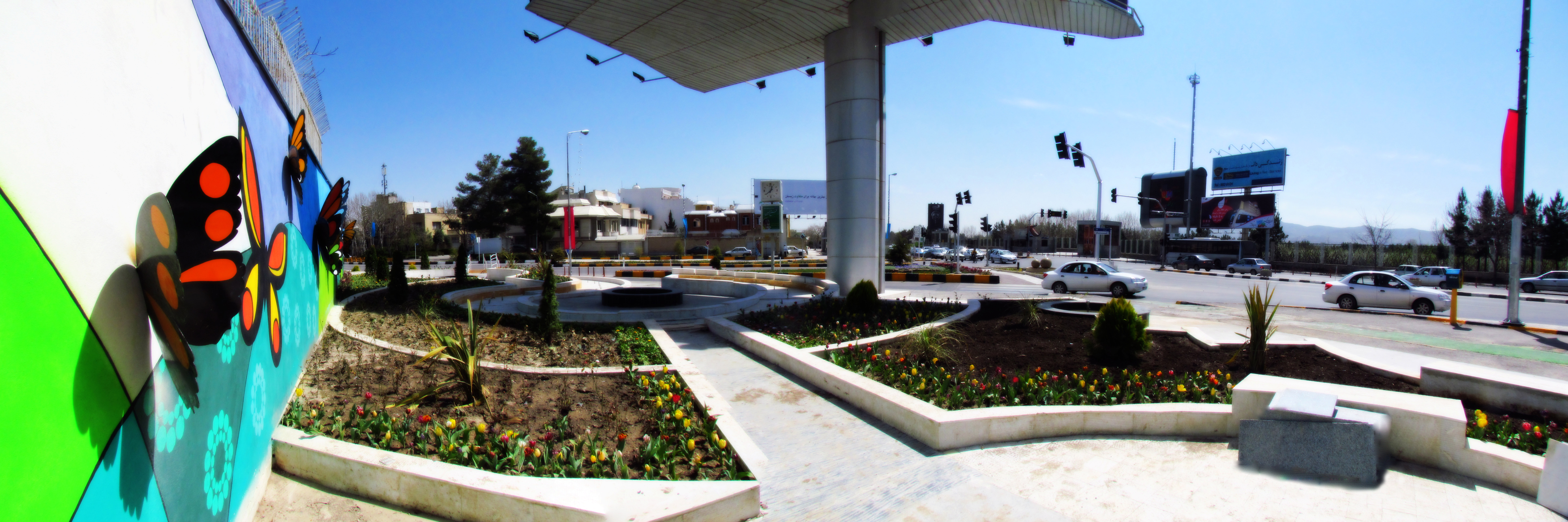 سه راه خیام شهر مشهد